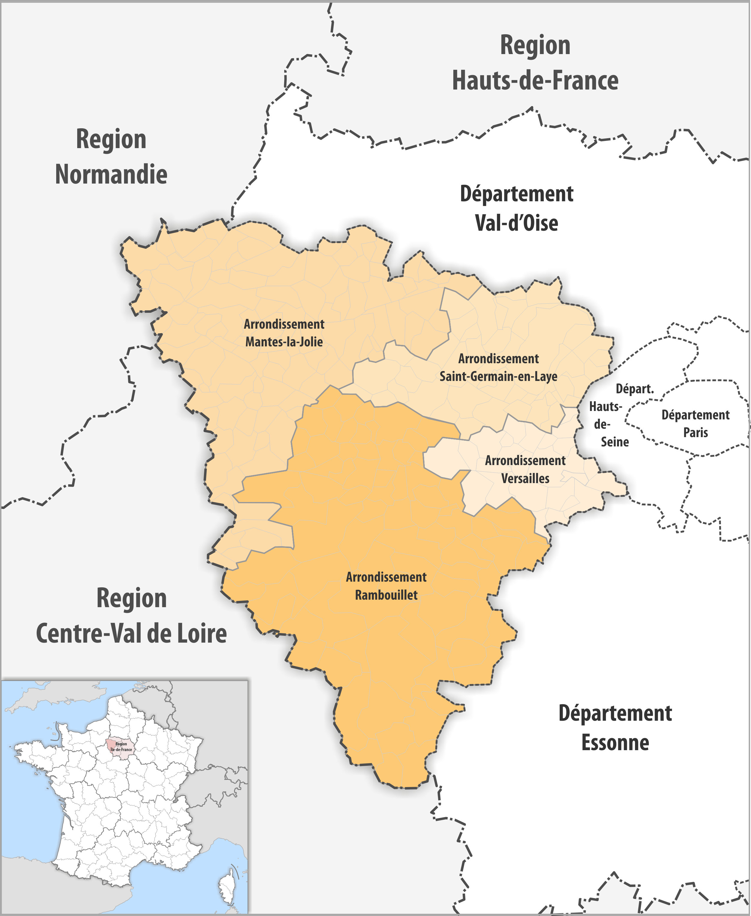 Gemeinden und Arrondissemente im Departement Yvelines